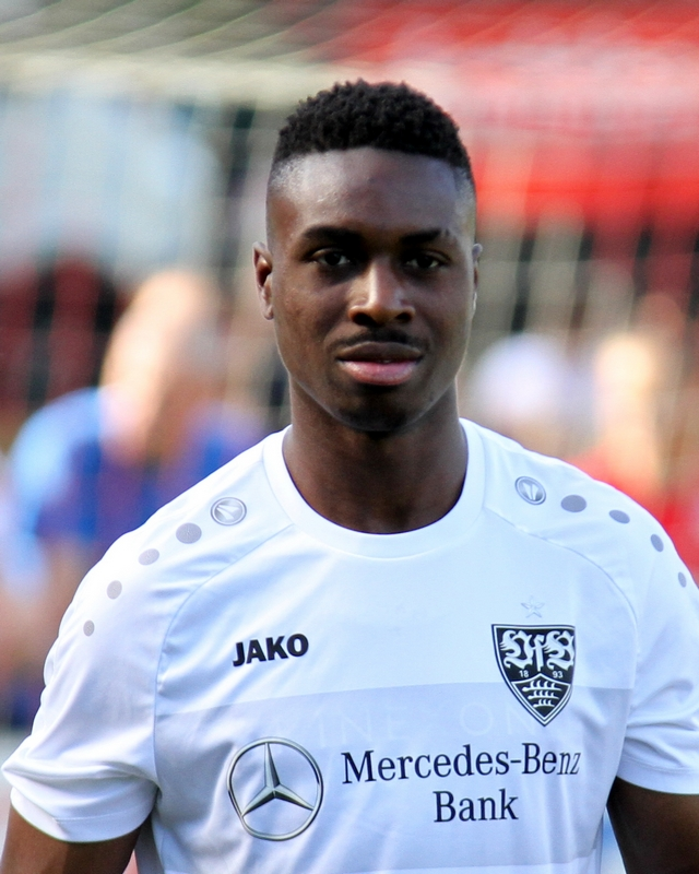 Maxime Awoudja beim Warm-Up vor dem Testspiel in Backnang 2019. Aufgenommen von